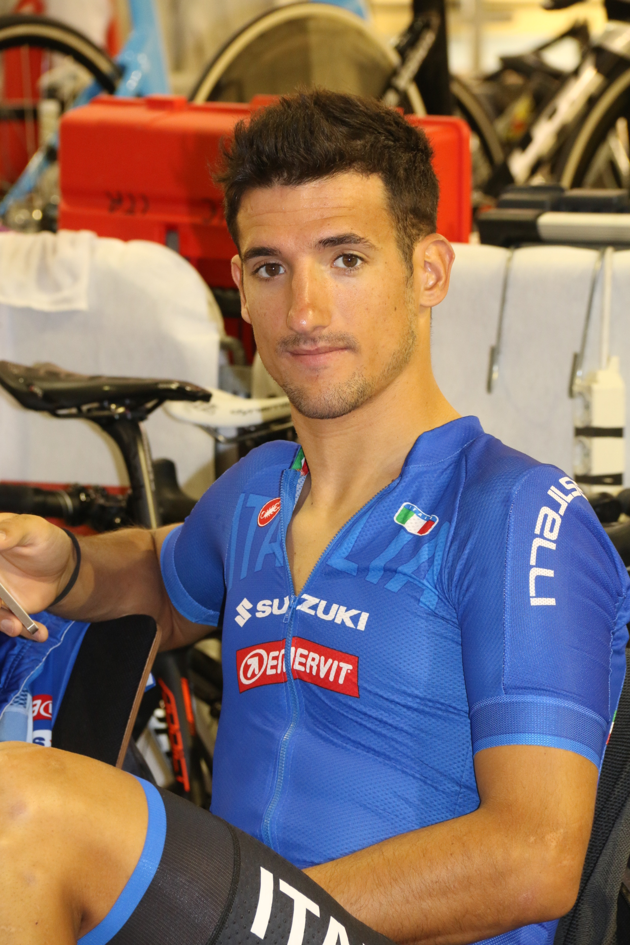 Liam Bertazzo, italienischer Radsportler